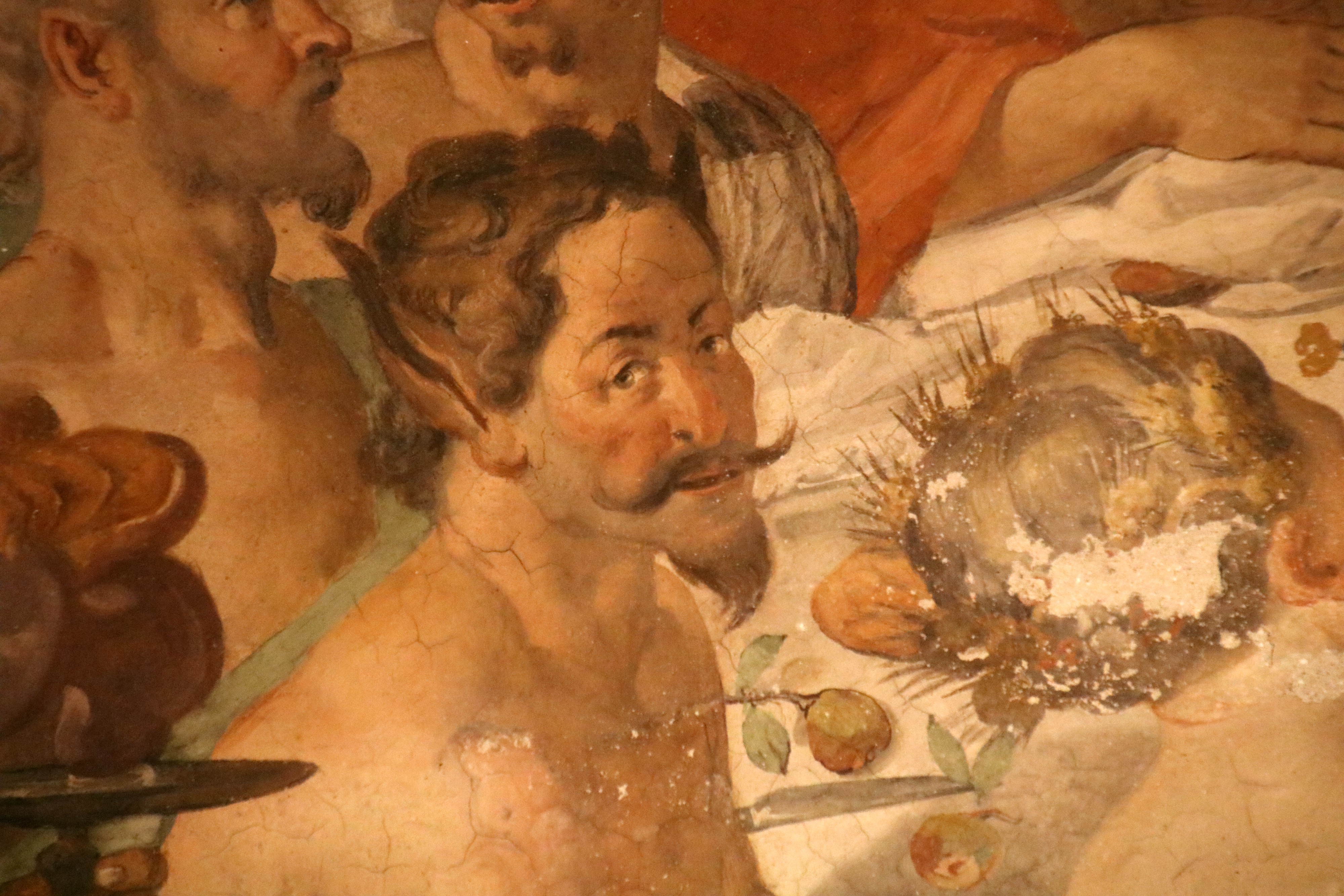 Il Convivio degli dei di Andrea Boscoli, 1592, Villa di Corliano